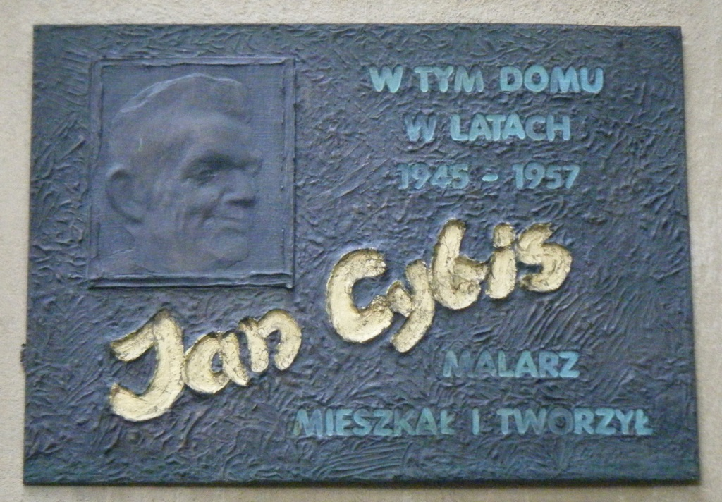 Tablica upamiętniająca Jana Cybisa. Warszawa, Saska Kępa, ul. Walecznych 28.